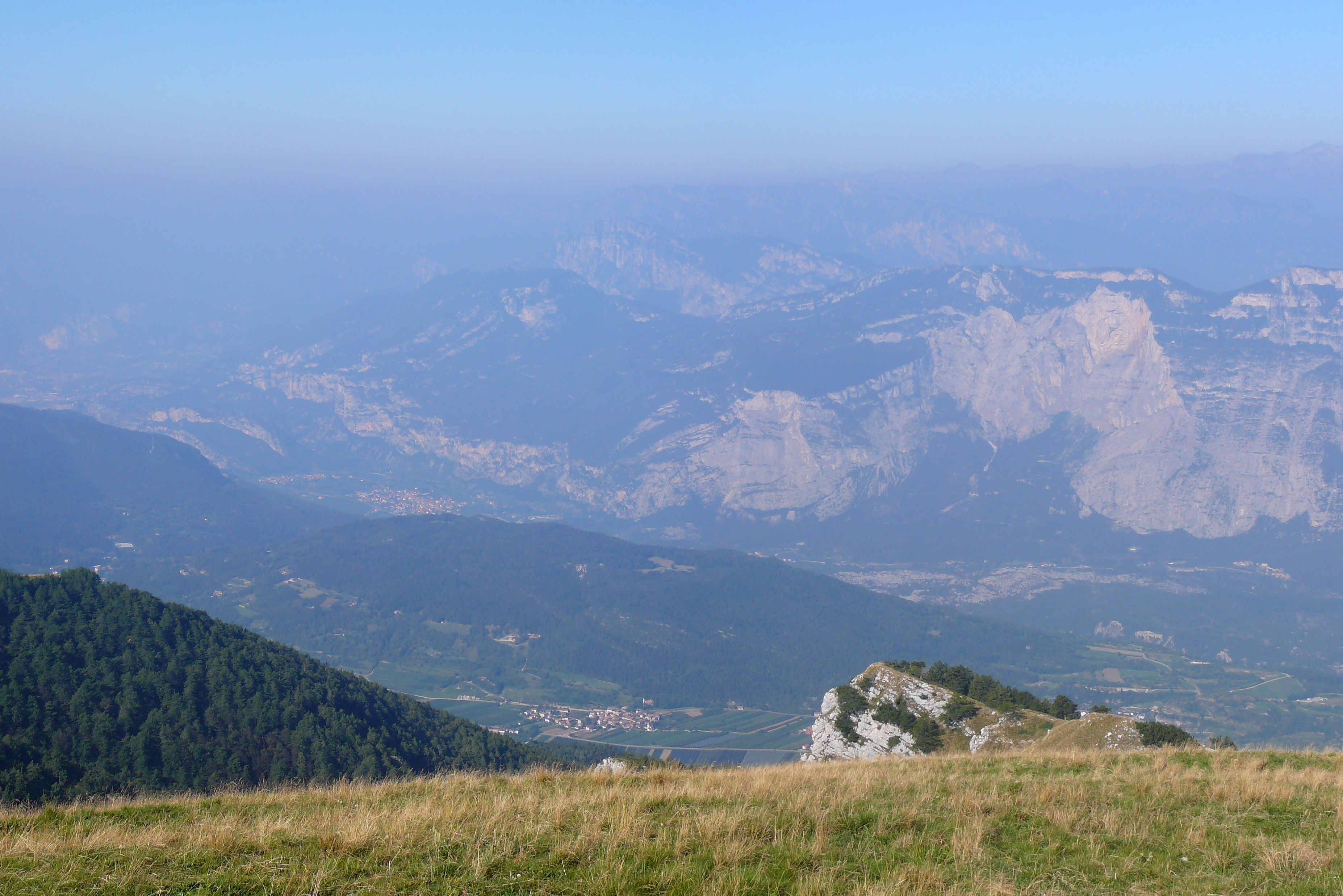 Valle dei Laghi